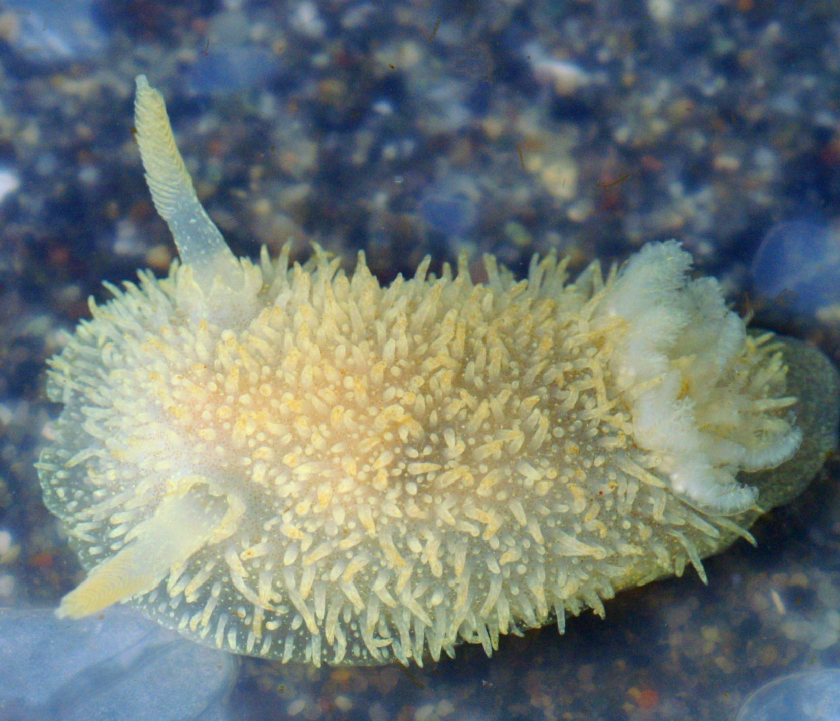 Acanthodoris pilosa (false colors)